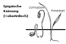 Epigeal